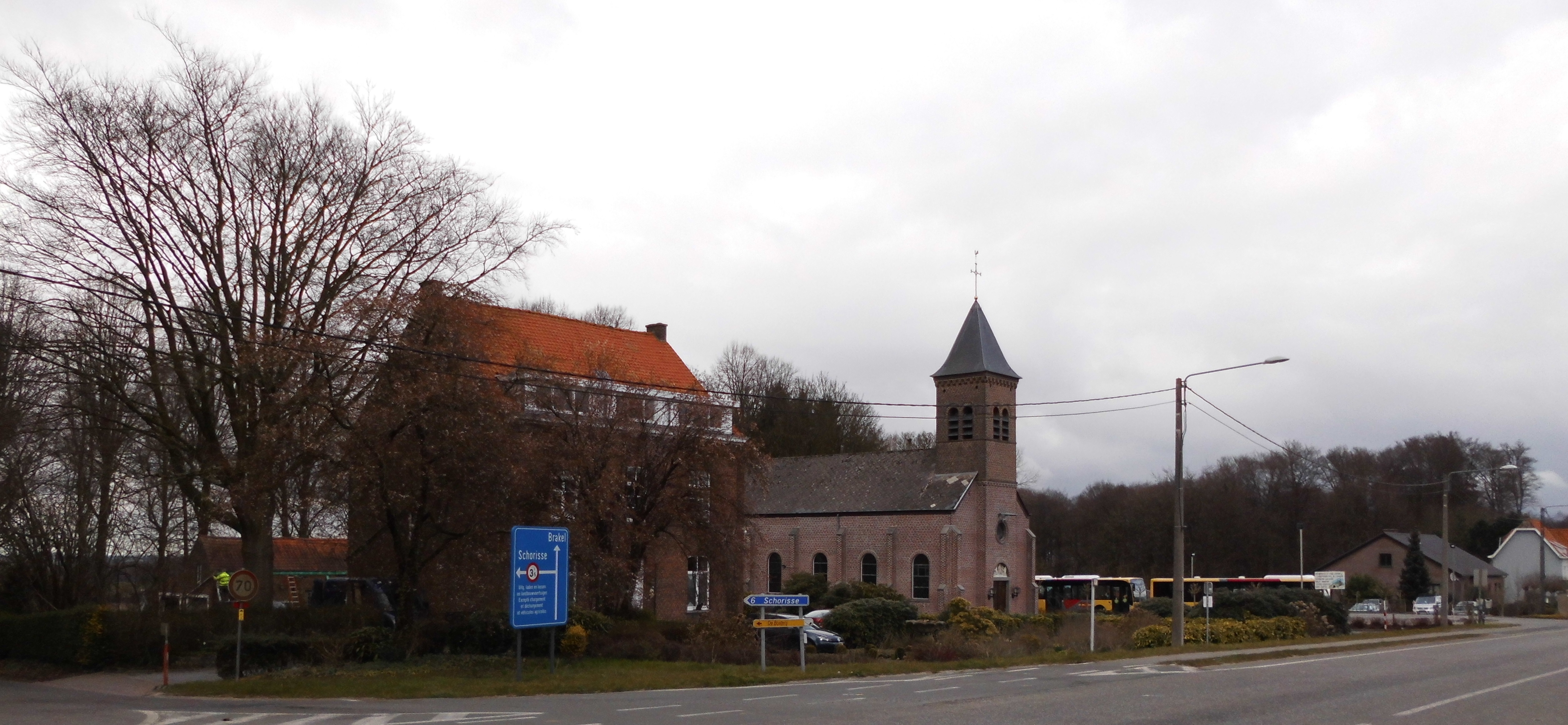 Notre Dame de Lourdes langs de N48 - d'Hoppe - Vloesberg - Henegouwen - België